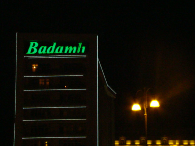 Badamlı süfrə suyunun Bakıda, Gənclik metrosu yanındakı bina üzərində reklamı